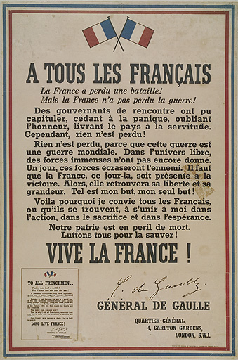 Affiche reproduisant un texte du général de Gaulle, quelques jours après le célèbre appel du 18 juin 1940.